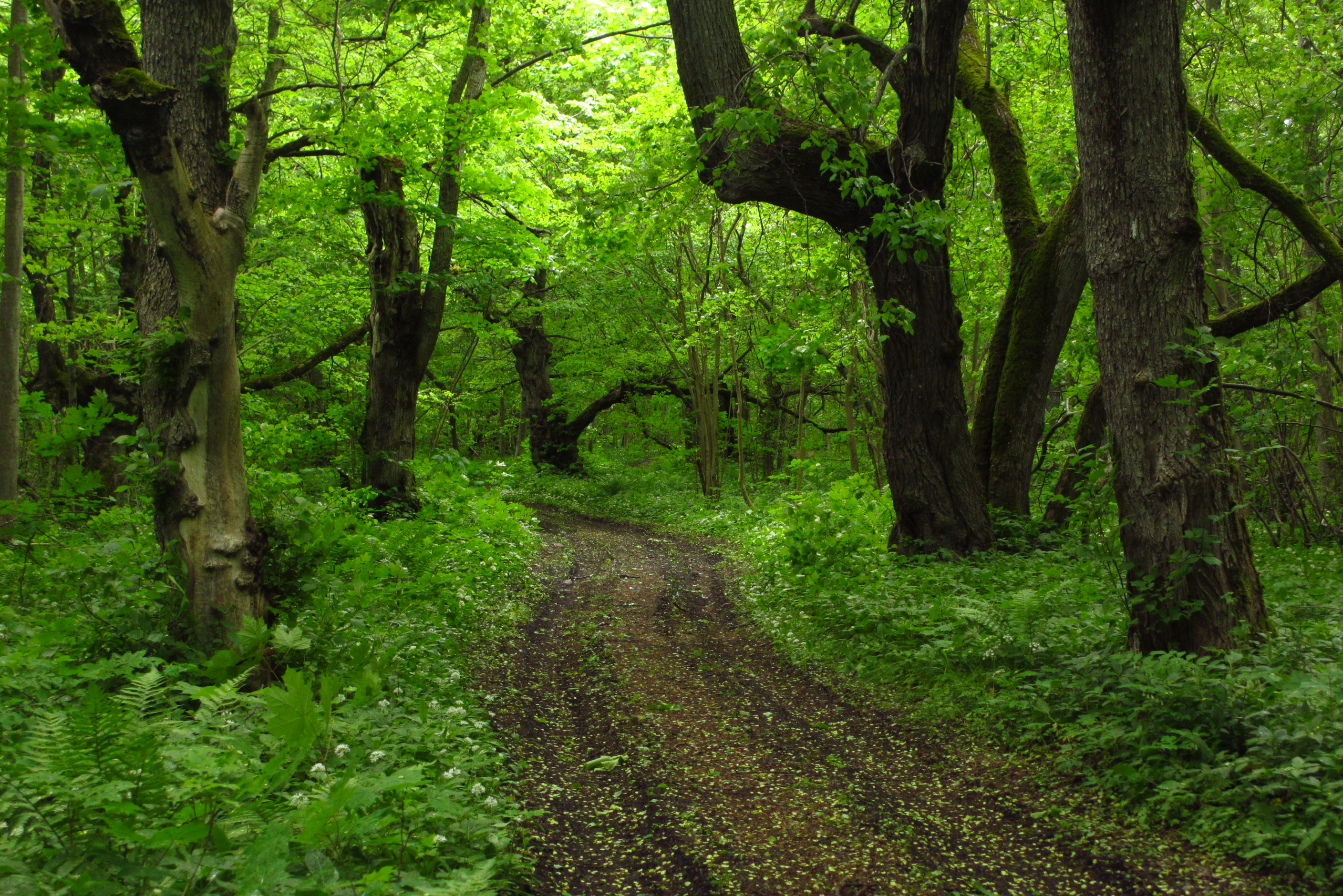 Abruka salumets Abruka LKAl